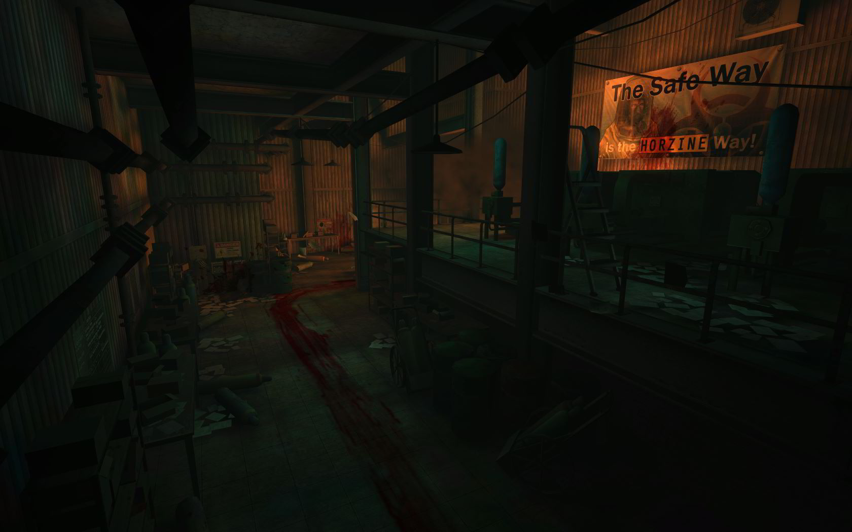 Action du jeu vidéo Killing Floor